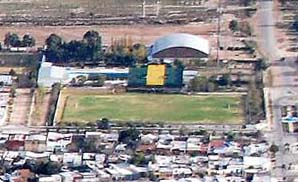 Estadio del Club Atlético Puerto Comercial en Ingeniero White, provincia de Buenos Aires.